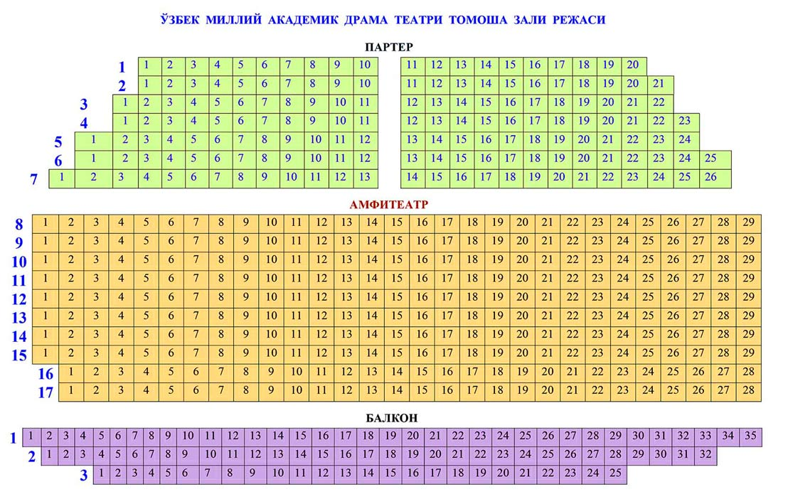 Oʻzbekcha/ўзбекча: ЗАЛ ЧИЗМАСИ